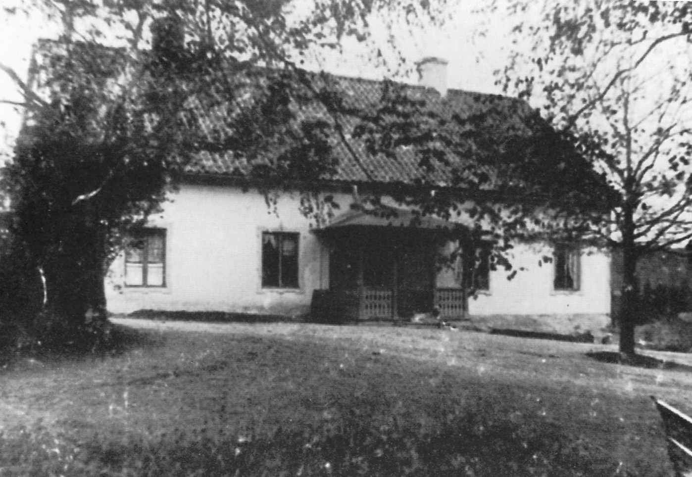 Stuvsta gårds huvudbyggnad